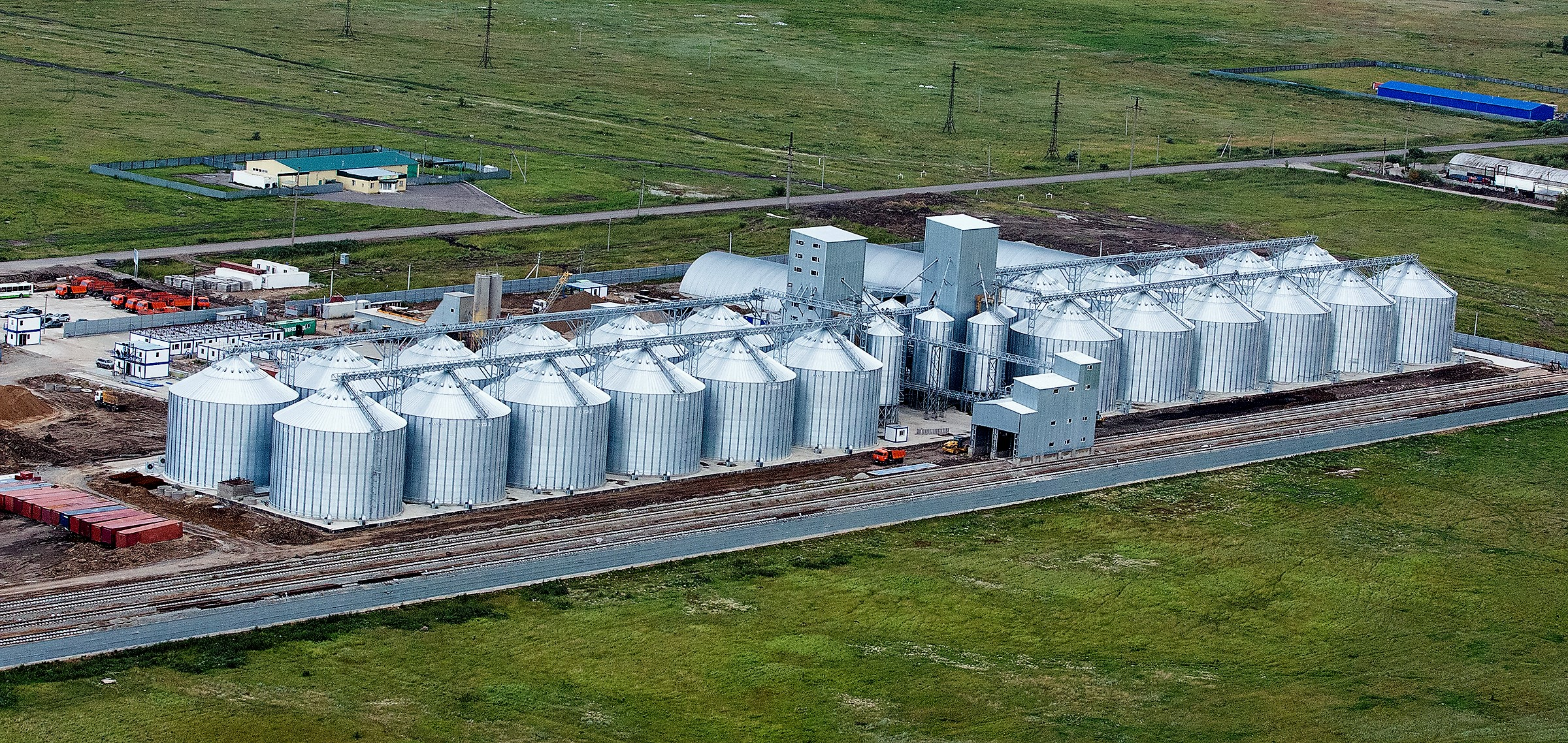 зерновой терминал SCAFCO в Казахстане